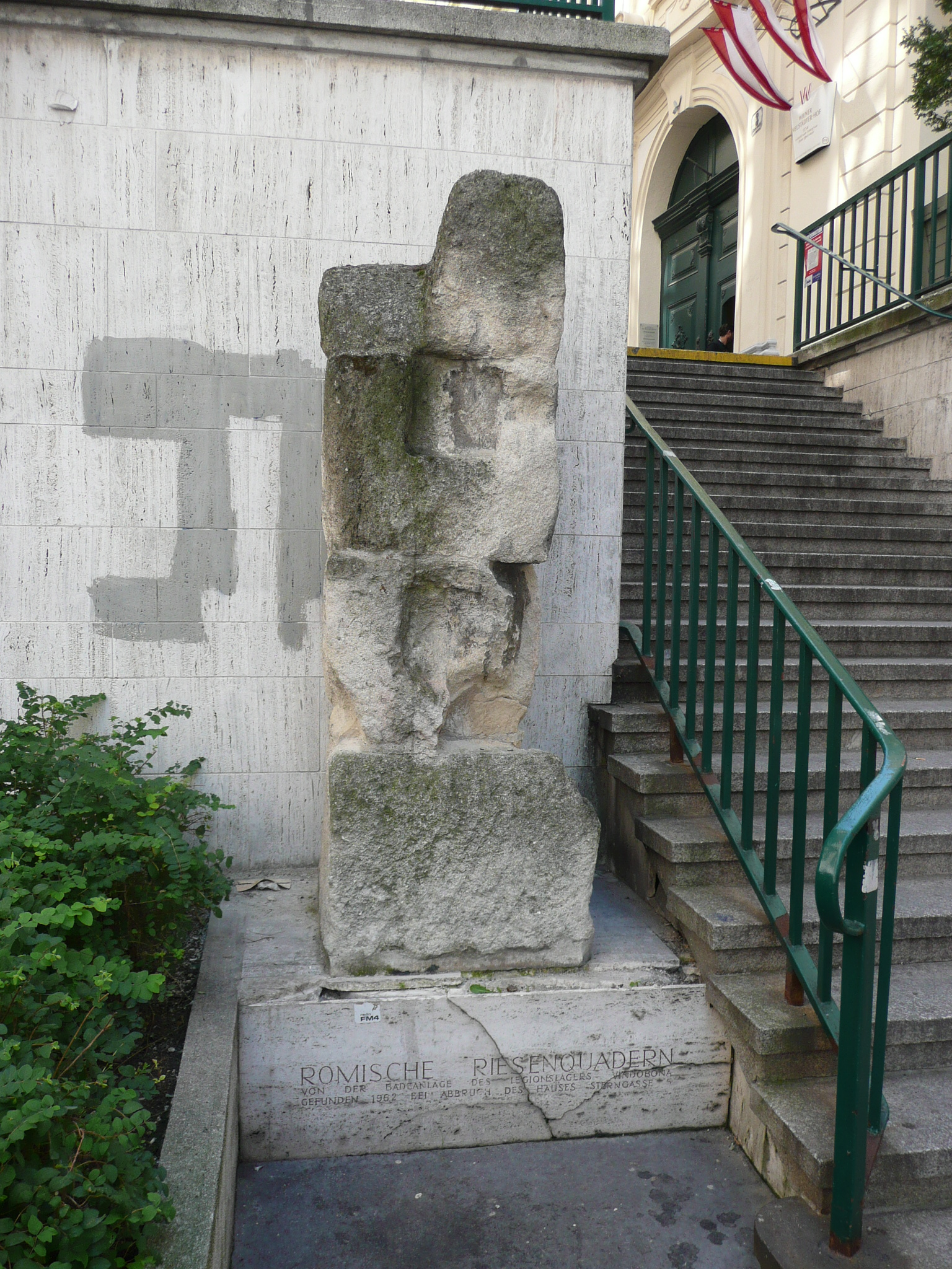 Roemische Quader von der Badeanlage des Legionslagers Vindobona an der Theodor-Herzl-Stiege, gefunden 1962 bei Abbruch des Hauses Sterngasse 5.